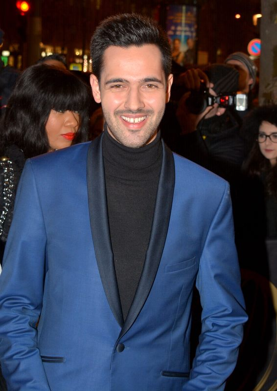 Yoann Fréget à la cérémonie des Globes de cristal